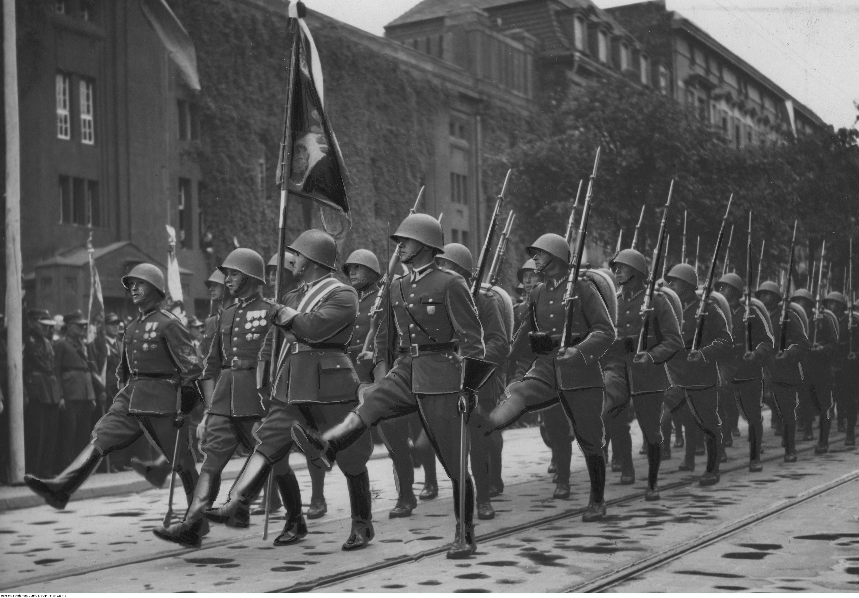 Święto 73 pułku piechoty w Katowicach - poczet sztandarowy na czele defilady; lipiec 1938. Koncern Ilustrowany Kurier Codzienny - Archiwum Ilustracji. Sygnatura: 1-W-1294-9